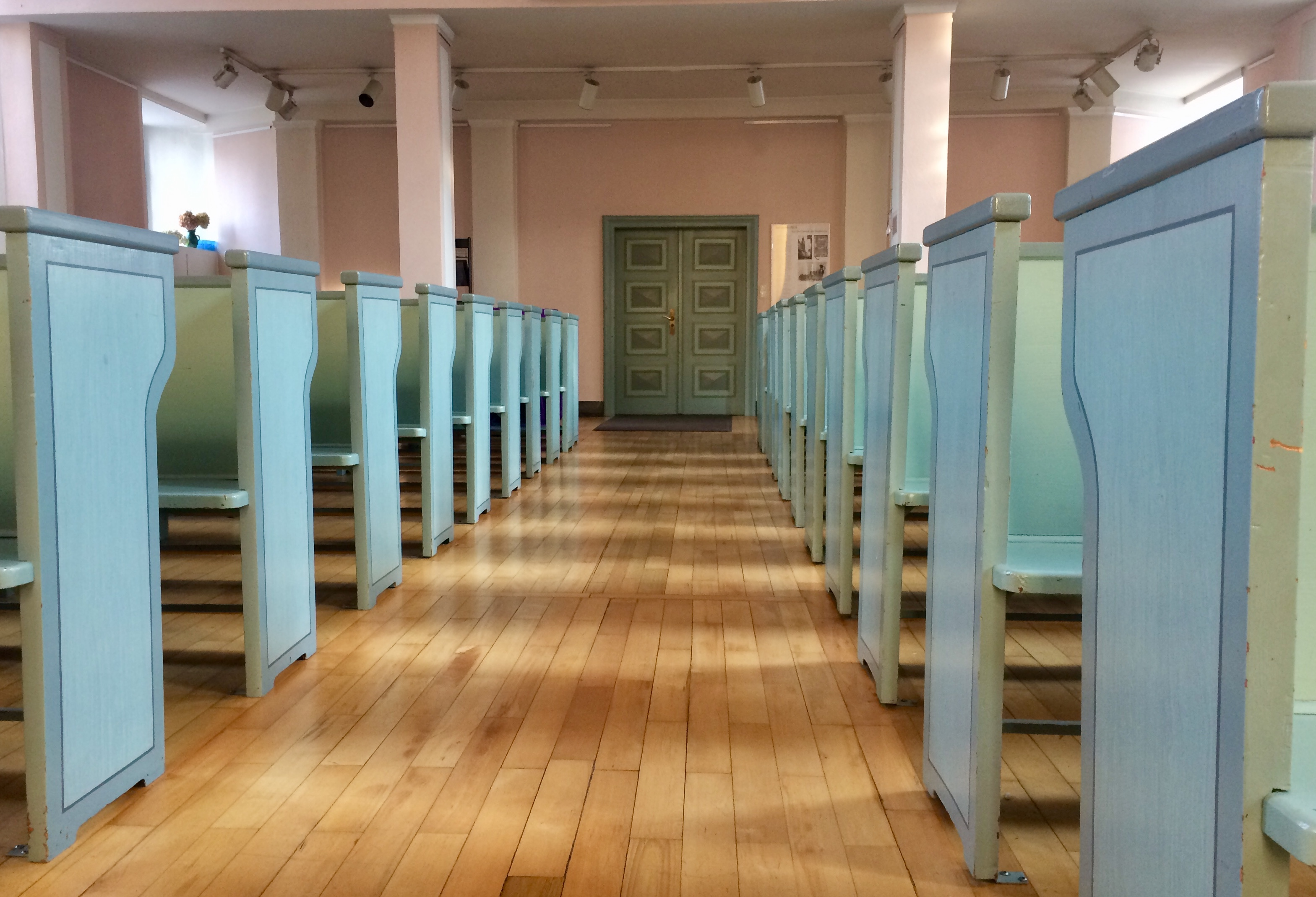 Blick vom Altar über die Bankreihen